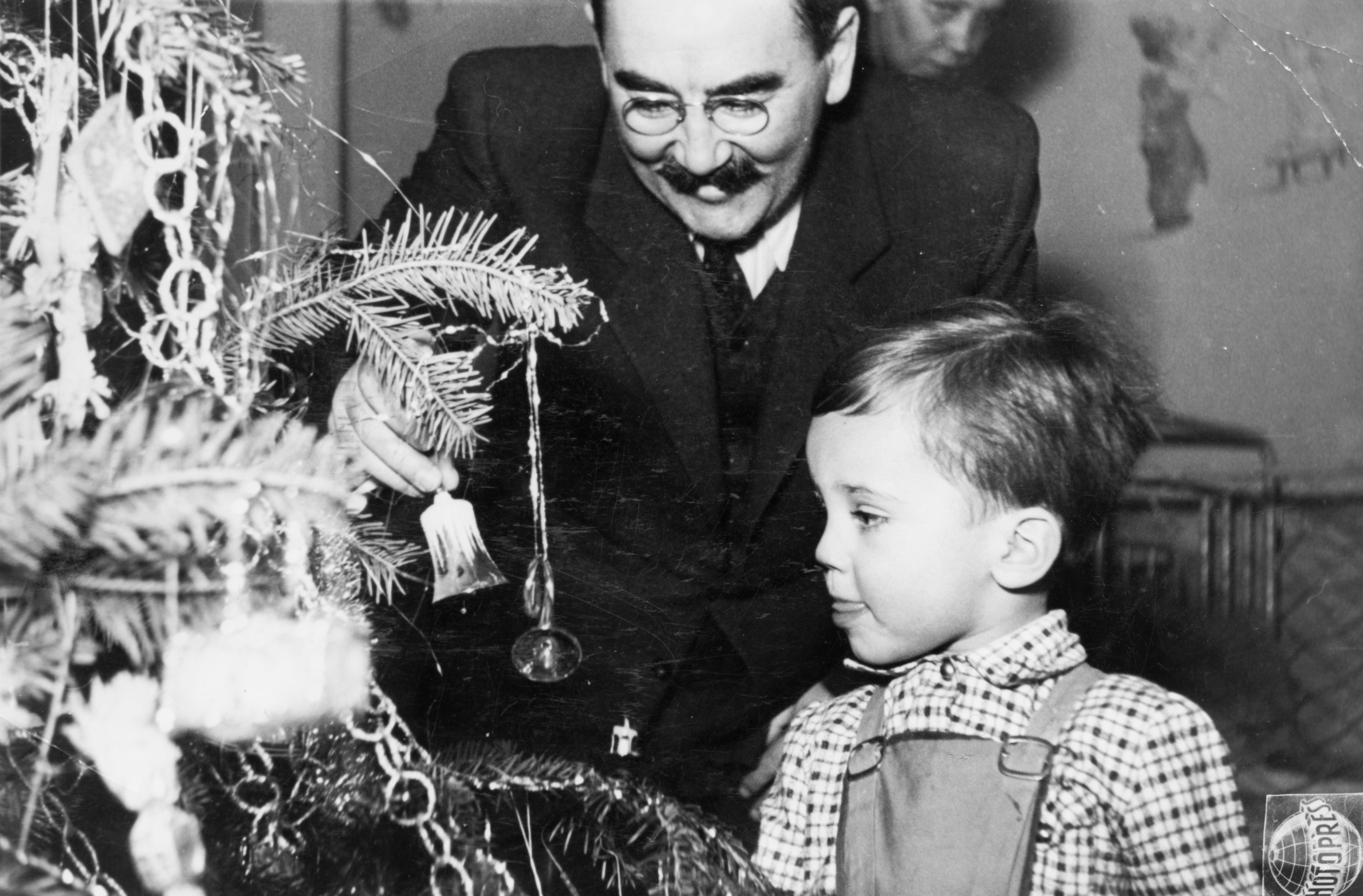 Karácsony, Nagy Imre későbbi miniszterelnök unokájával. Location: Hungary, Budapest Tags: celebrity, Christmas candy, moustache, christmas tree Title: Nagy Imre későbbi miniszterelnök unokájával.